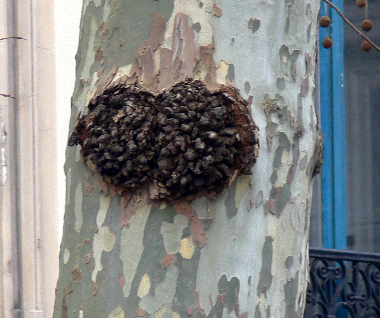 Tumeur sur platane (Lille, Nord de la France)